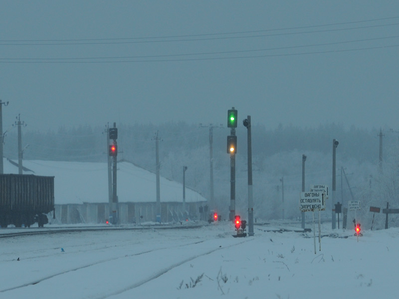 Выходной светофор станции Неприк с показанием «зелёный и лунно-белый», участок Кинель - Оренбург, оборудованный АЛСО